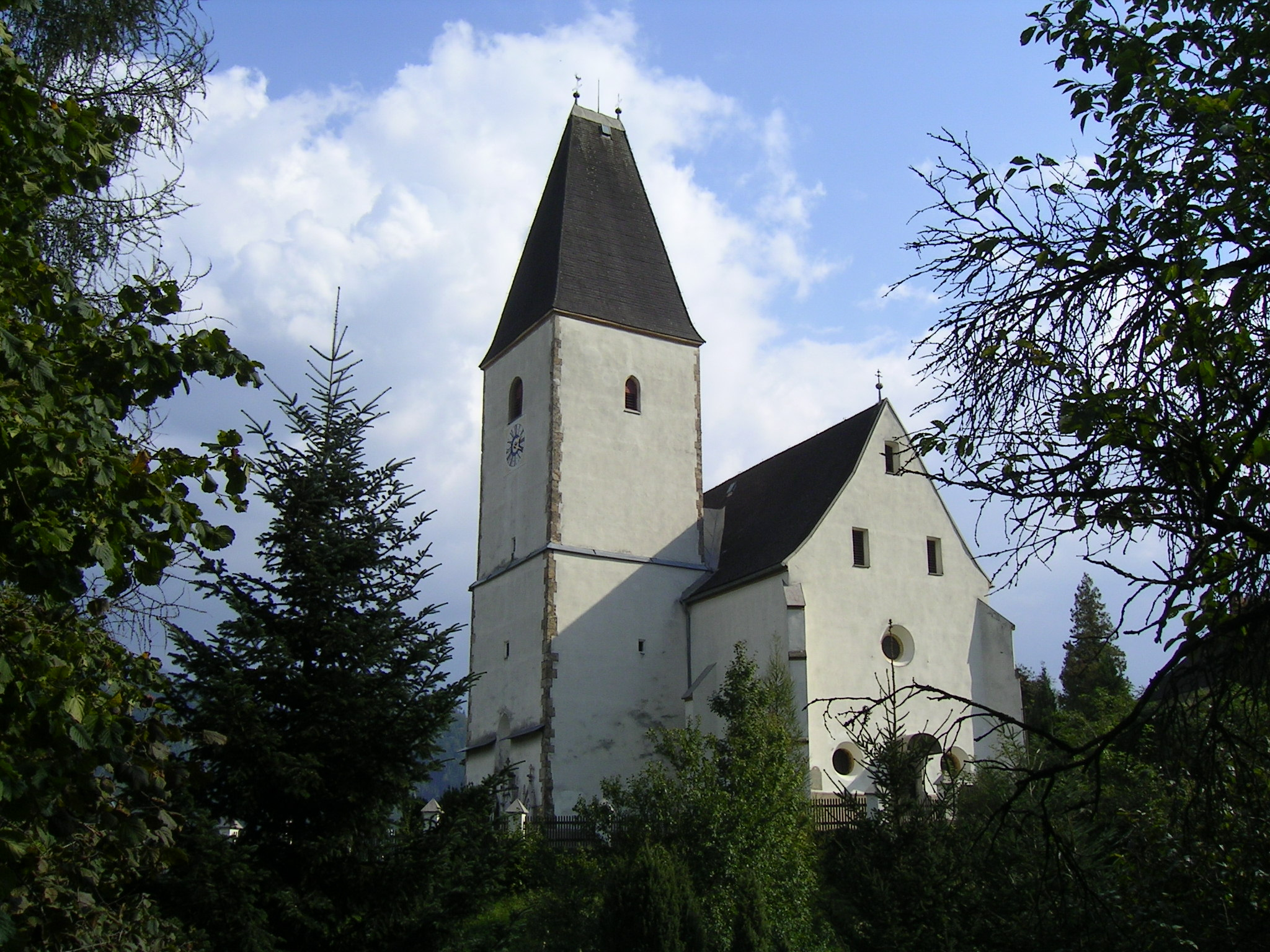 Kath. Pfarrkirche hl. Maximilian